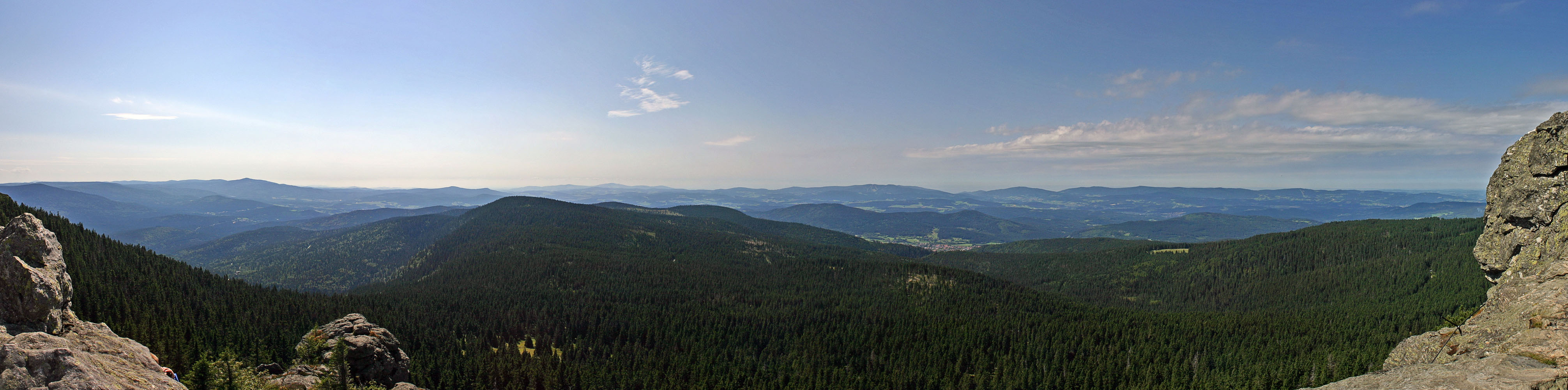 Panoramablick vom Großen Arber nach Süden und Westen